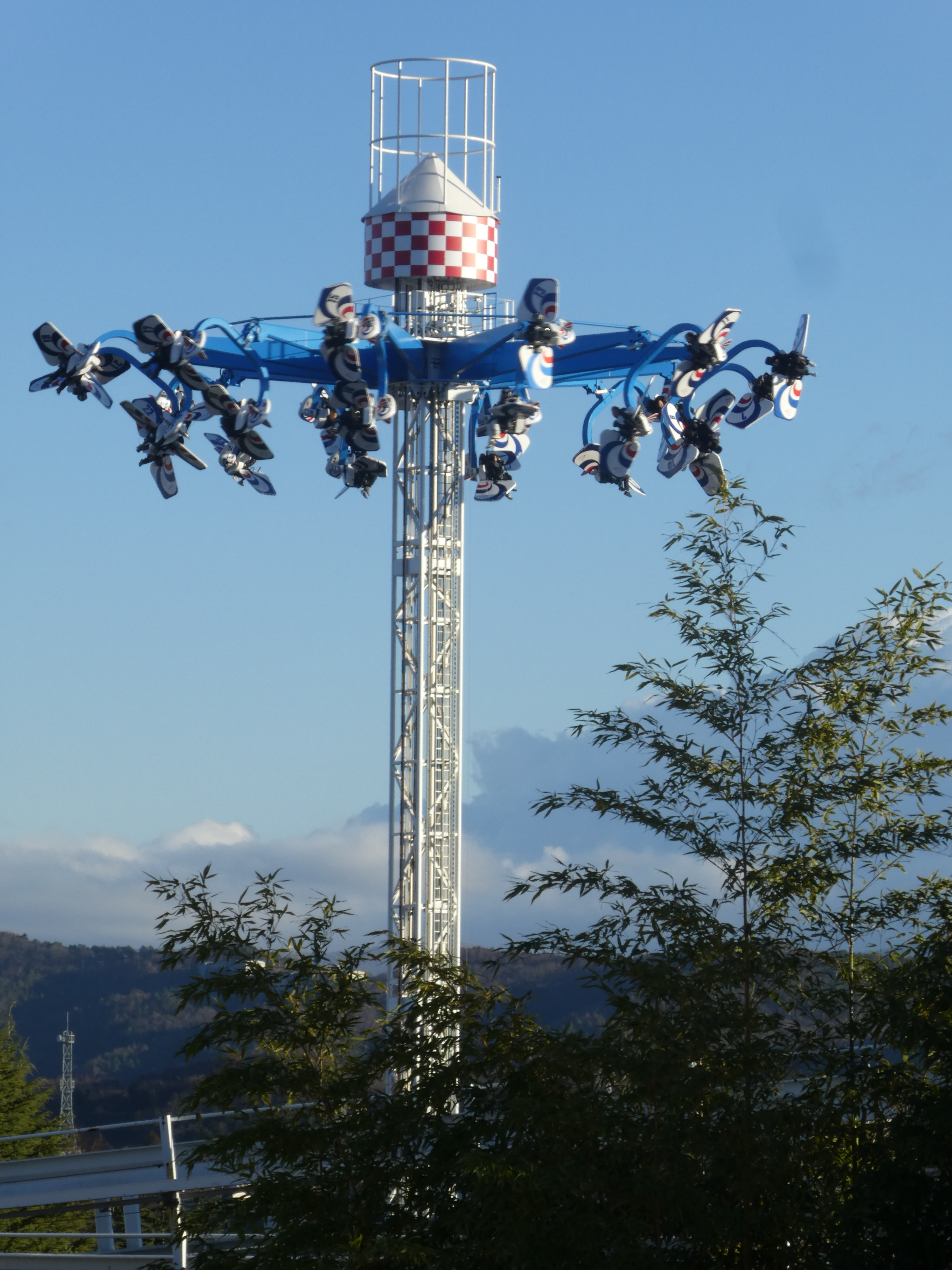 テンテコマイの写真。